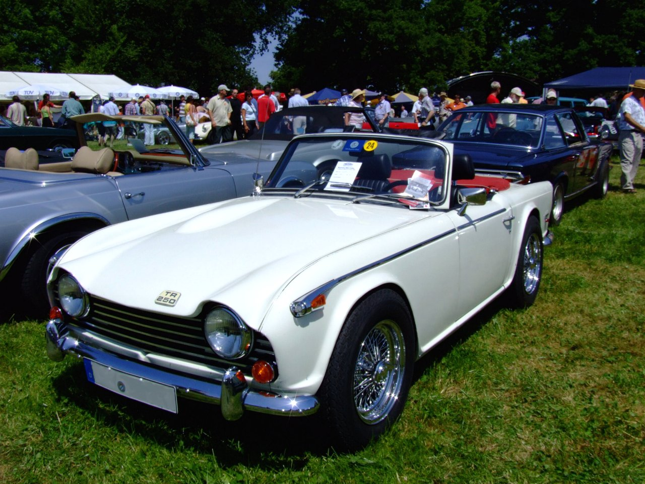 Triumph TR250 Baujahr: 1968 140 PS